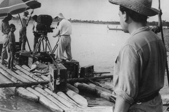 Filmación de "La Vertiente" del cineasta boliviano Jorge Ruiz (1958)